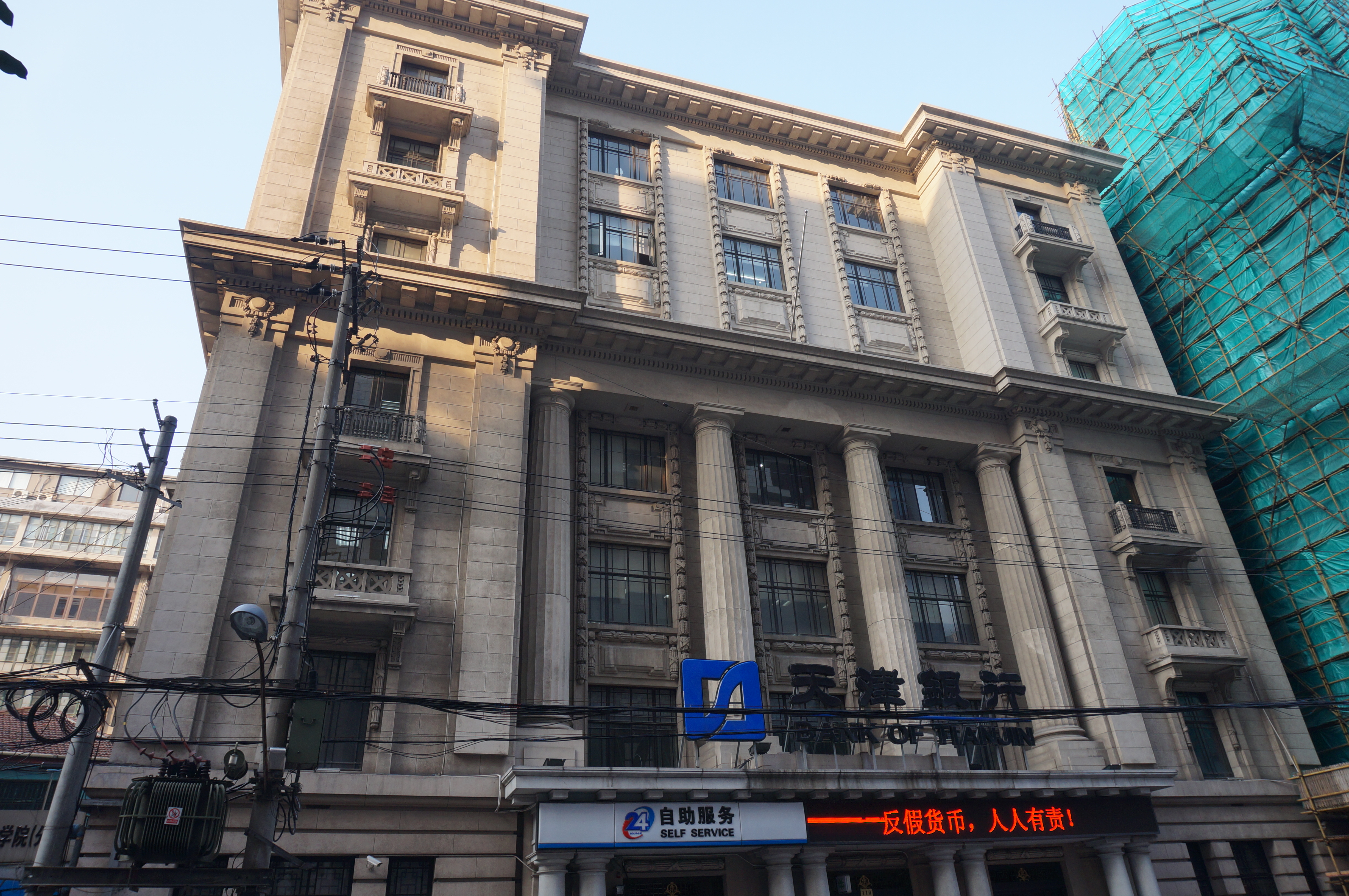 中文（中国大陆）: 上海市第三批优秀历史建筑——中南大楼